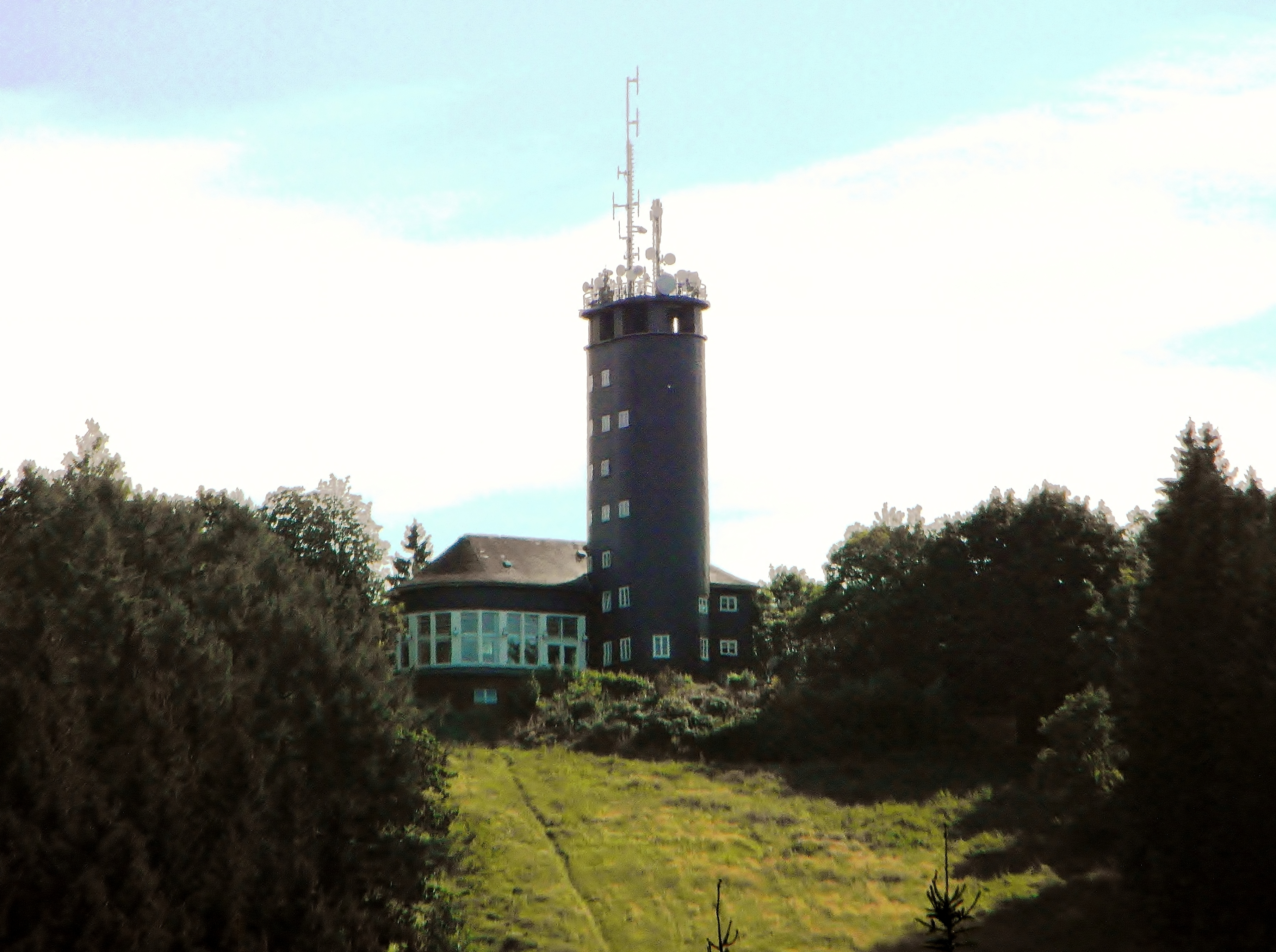 Blick auf den Aussichtsturm von der Zufahrt Verbindungsstraße Altenhundem-Bilstein